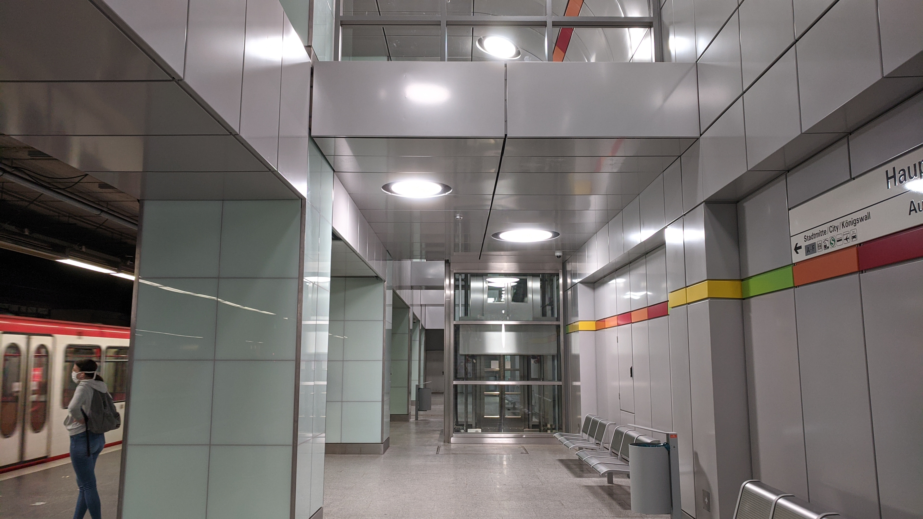 Stadtbahn Dortmund, U-Bahnhof Dortmund Hauptbahnhof, Der neu verbreiterte Bahnsteig Richtung Innenstadt. Der Bahnhof wird zur Zeit umgebaut. Dabei werden die vorhandenen Bahnsteige verbreitert und neue Zugänge eingebaut. Taken on 29 May 2020